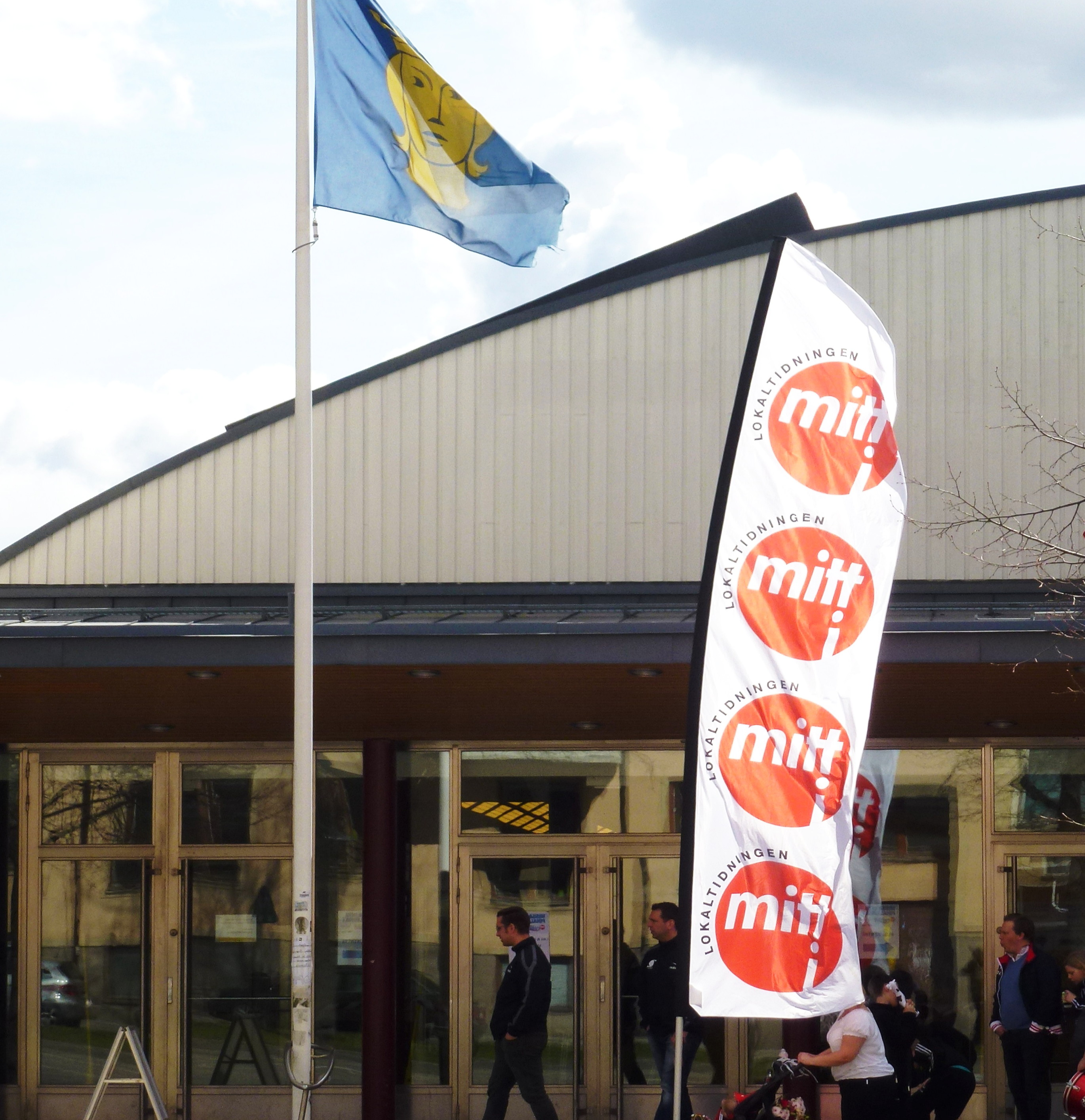 Lokaltidningen "Mitt i ..." vid Ringvägen